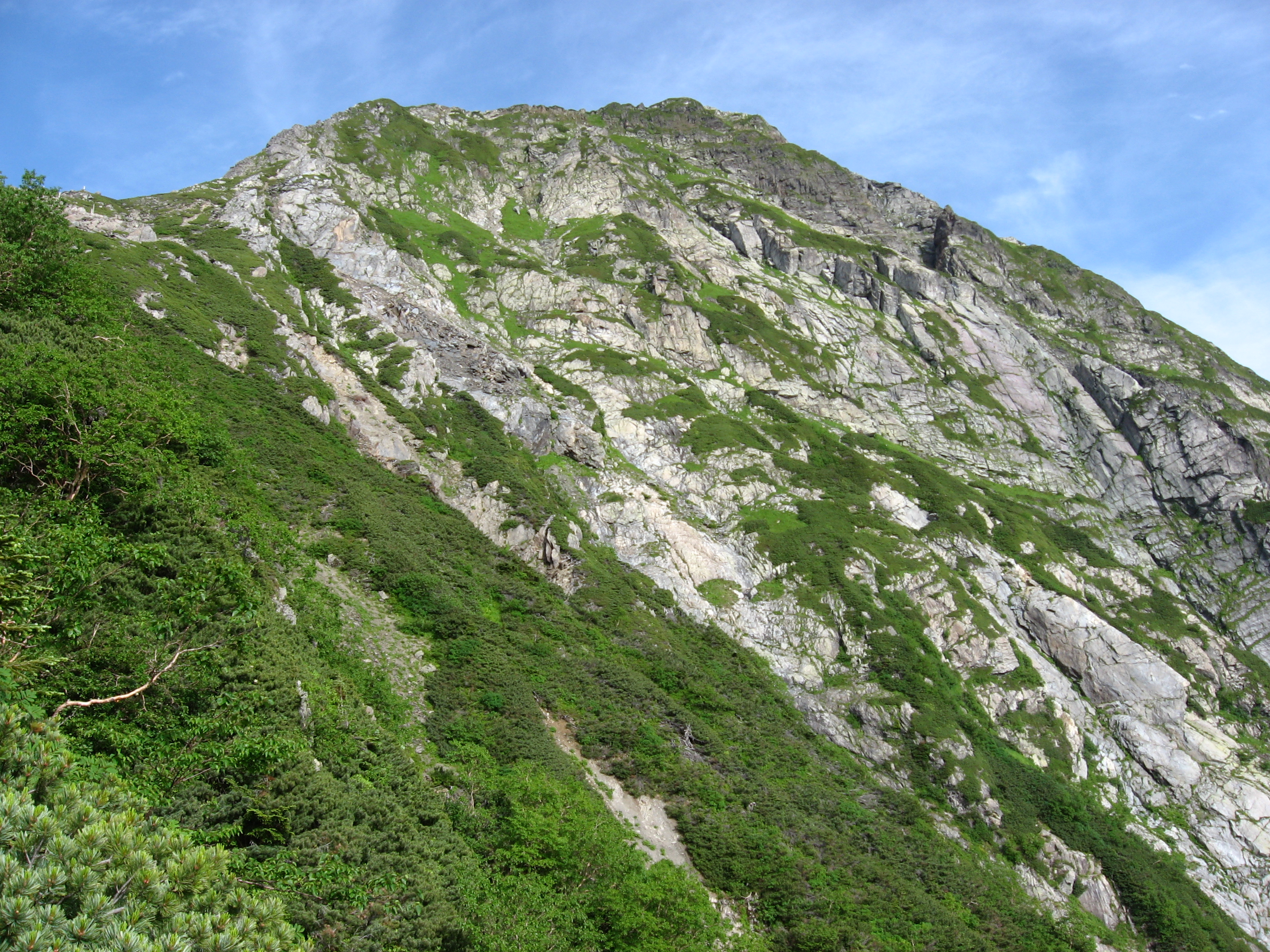 北岳バットレス